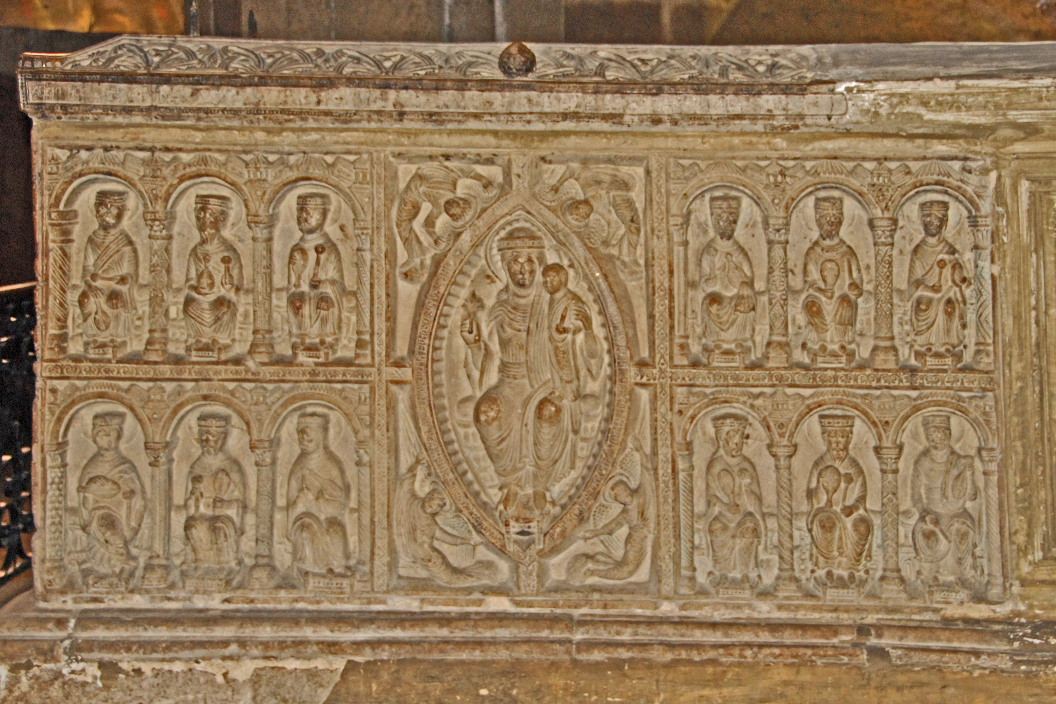 St-Junien, Sarkophag, Nordseite